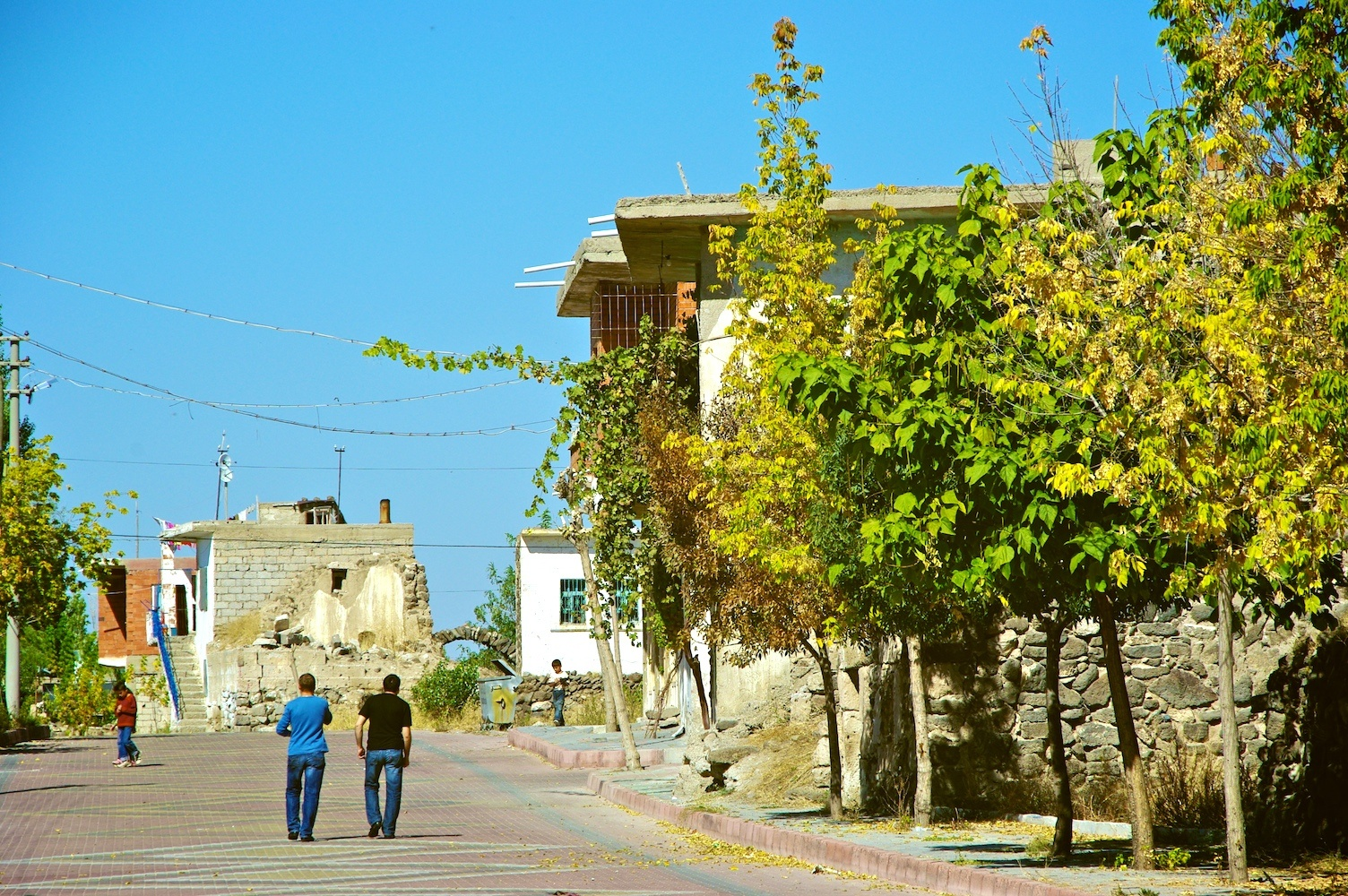 Acıgöl, Nevşehir, Turkey